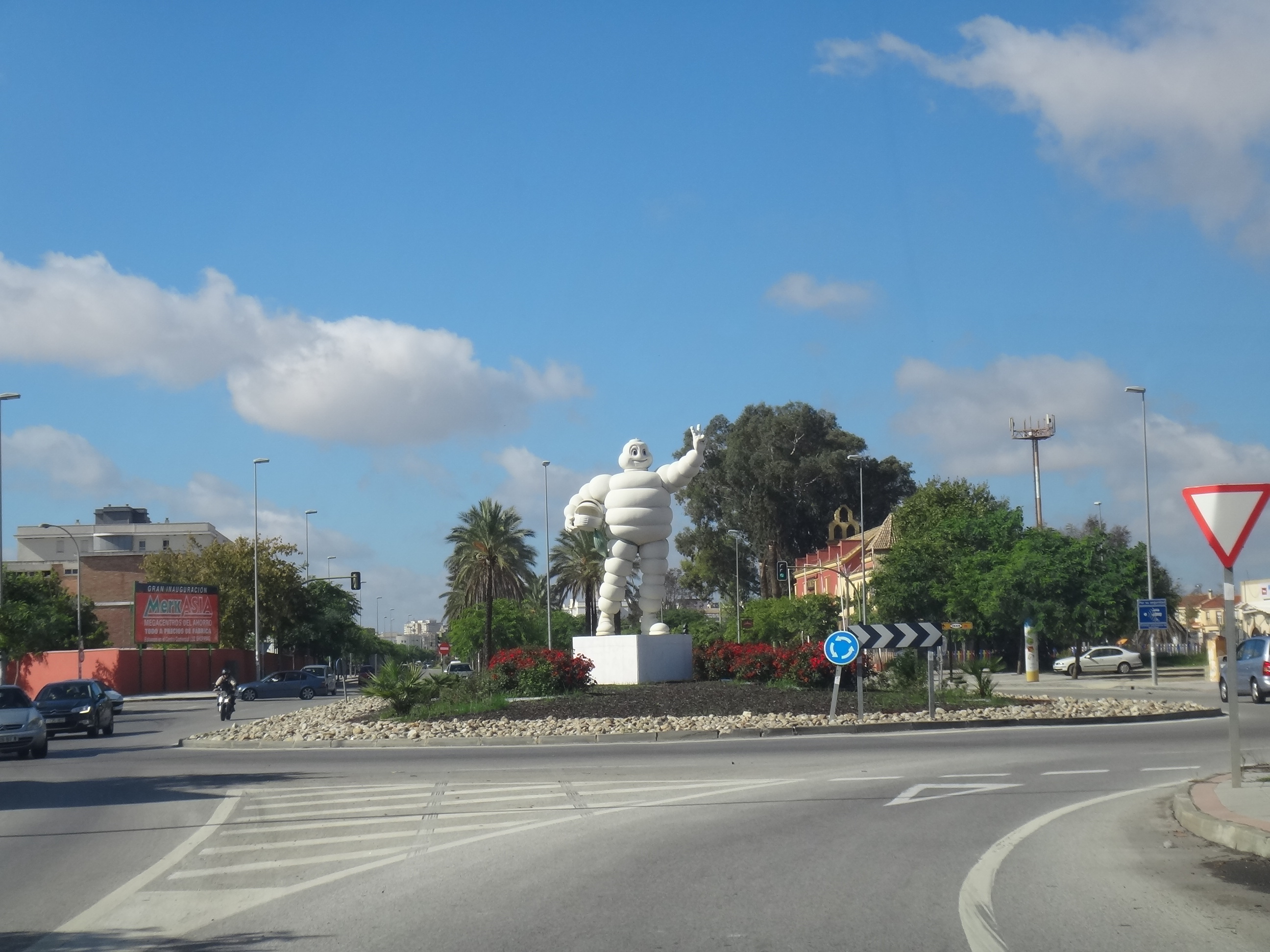 Glorieta de Michelin en Jerez de la Frontera (Andalucía, España)